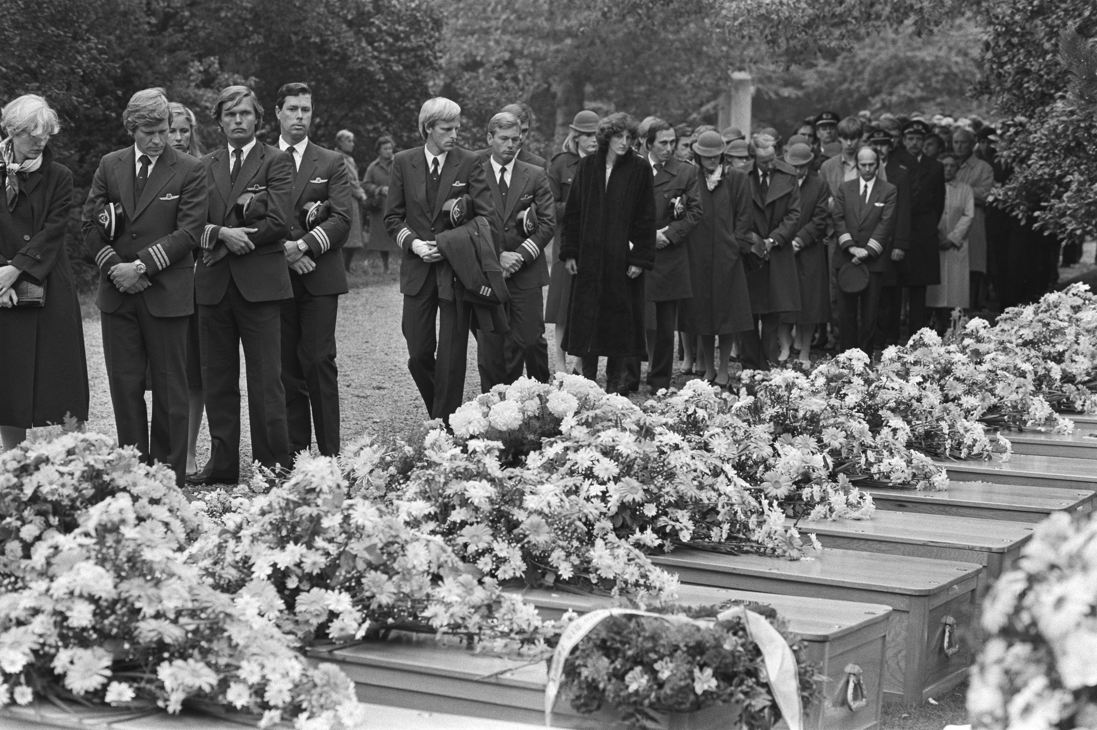 Collectie / Archief : Fotocollectie Anefo Reportage / Serie : [ onbekend ] Beschrijving : Herdenking van de slachtoffers van de vliegramp met het vliegtuig van de NLM bij Moerdijk op de Nieuwe Oosterbegraafplaats in Amsterdam Datum : 16 oktober 1981 Locatie : Amsterdam, Noord-Holland Trefwoorden : herdenkingen, slachtoffers, vliegrampen Instellingsnaam : Oosterbegraafplaats Fotograaf : Antonisse, Marcel / Anefo Auteursrechthebbende : Nationaal Archief Materiaalsoort : Negatief (zwart/wit) Nummer archiefinventaris : bekijk toegang 2.24.01.05 Bestanddeelnummer : 931-7455